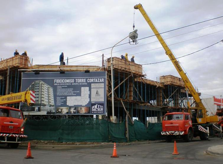 Hormigon sobre 1er. piso